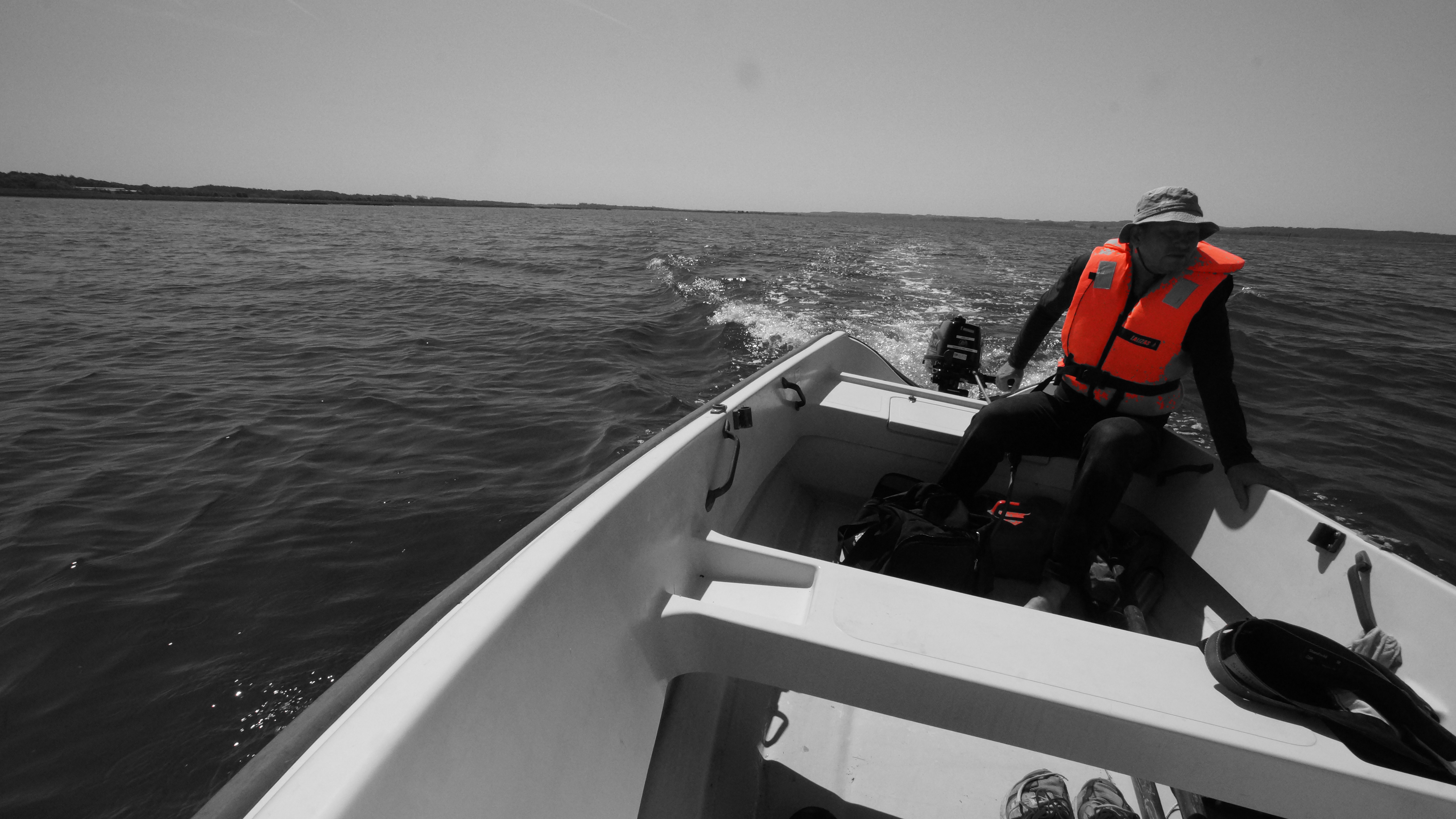 Kyst- og Fjordcentret Randers Fjord, jollesejlads